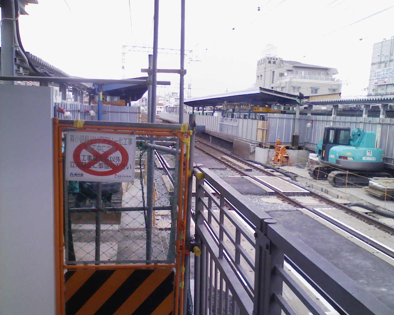 森小路駅エレベータ設置工事の模様、2010年3月29日撮影